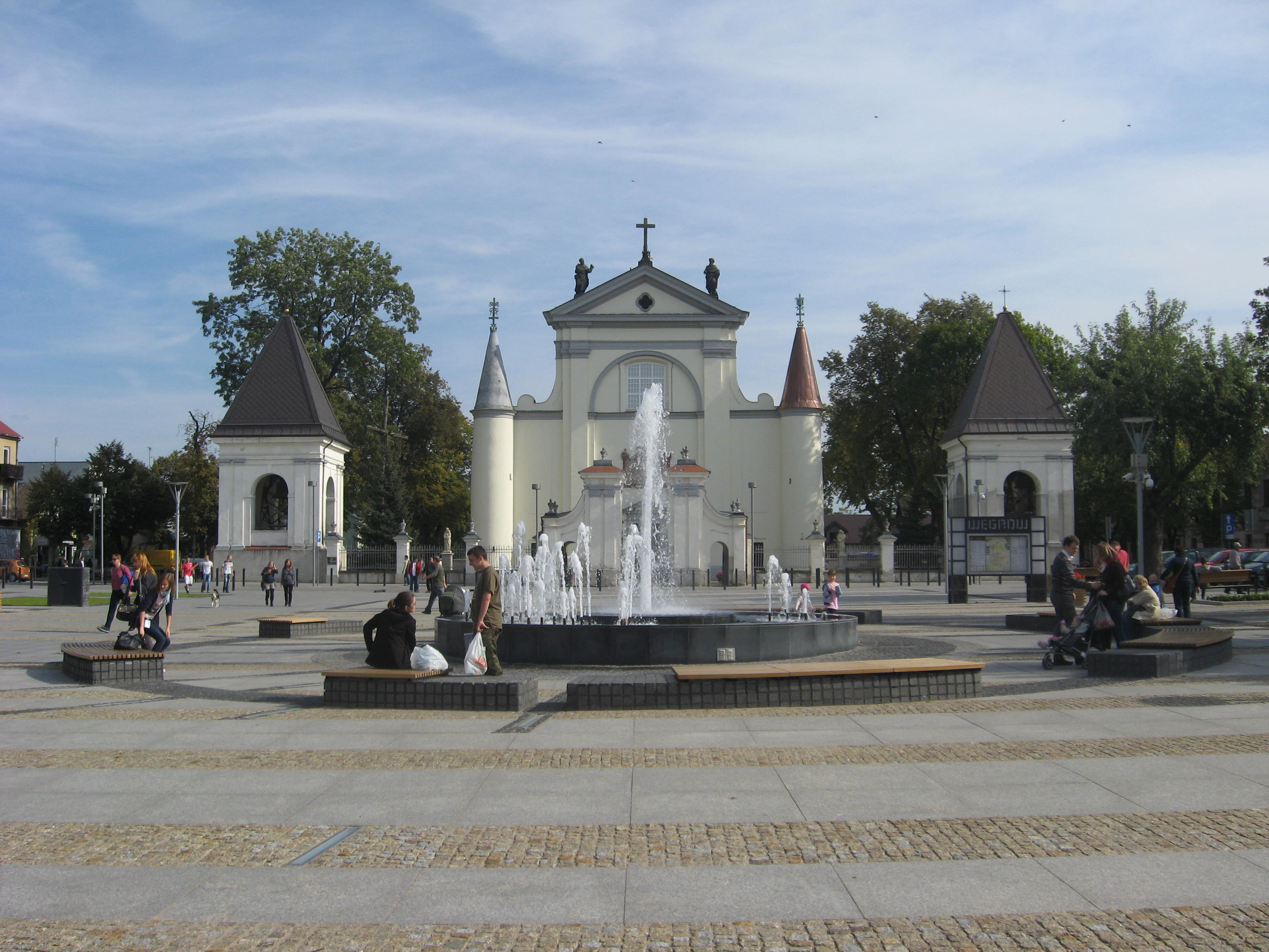 zespół kościoła par. p.w. Wniebowzięcia NMP i śś. Piotra i Pawła, Rynek, Węgrów, XVI-XVIII: kościół 2 dzwonnice brama ogrodzenie z bramką